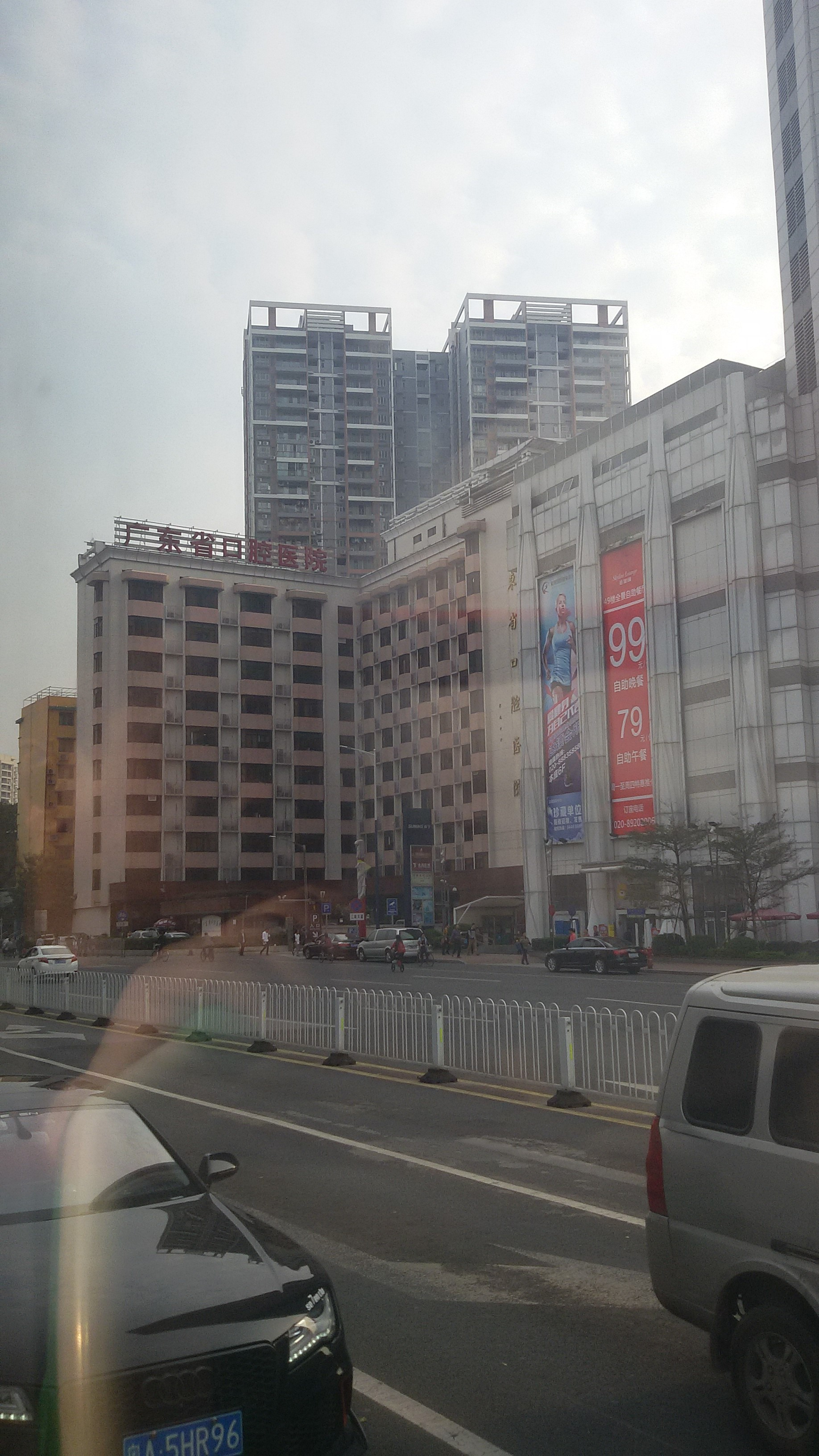 粵語: 廣東省口腔醫院總院